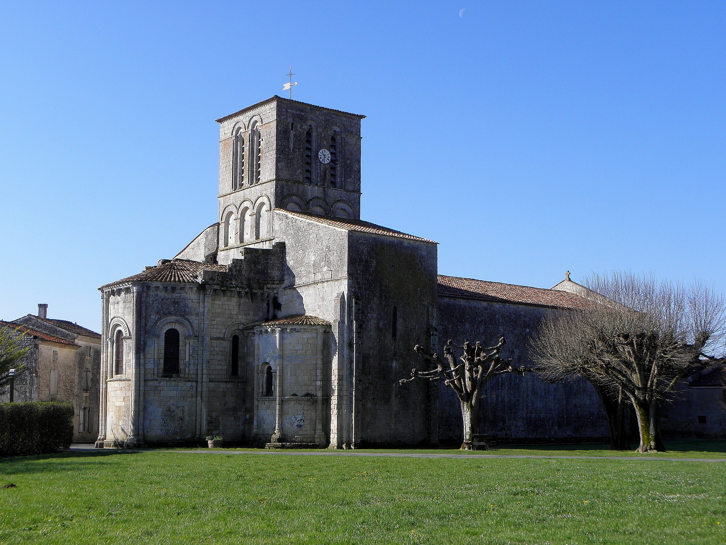 Église Saint-Germain de Varaize (17). Chevet et flanc nord.